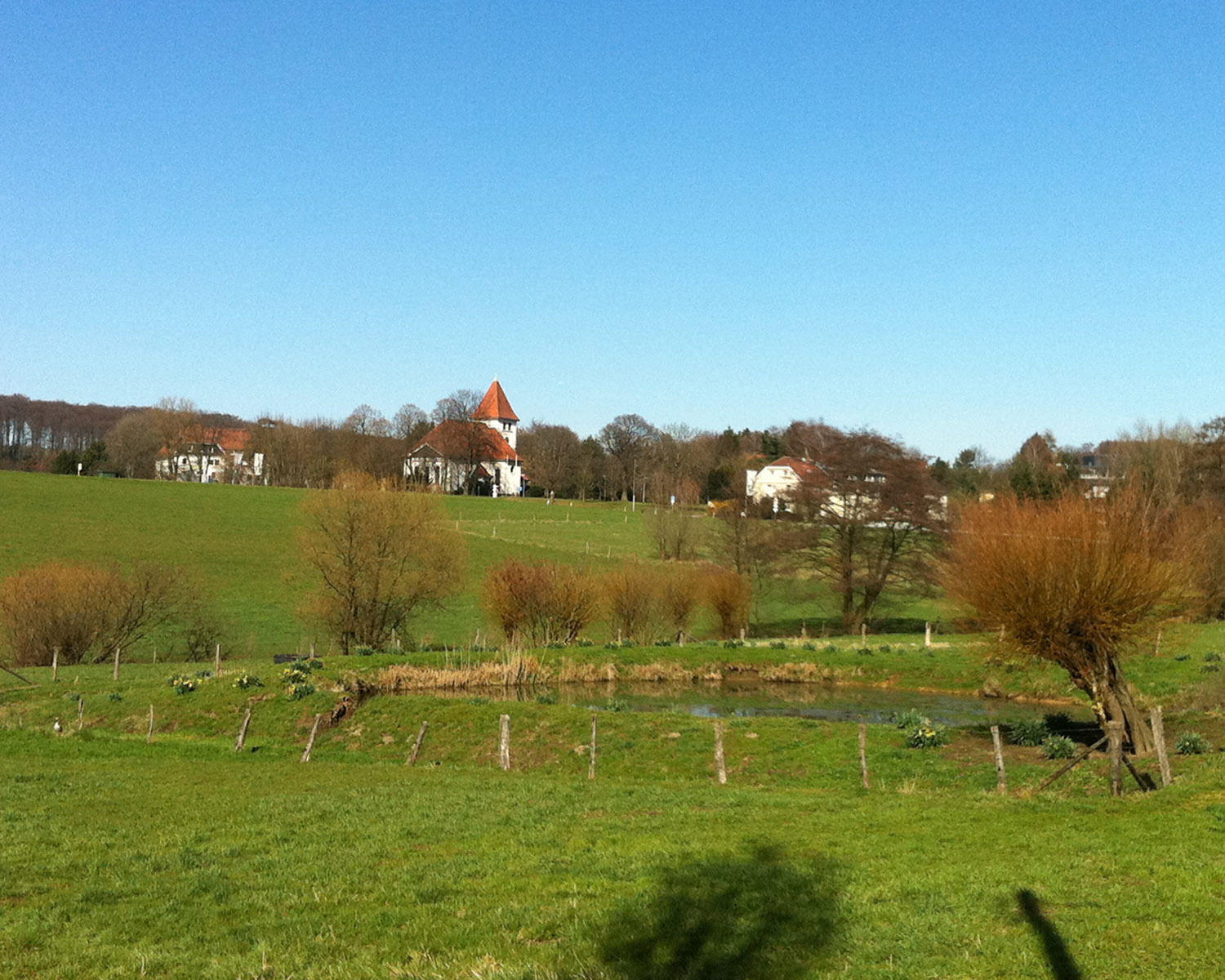 Blick vom Unterdüsseler Weg auf die Siedlung Eigen mit der Bergischen Diakonie Aprath